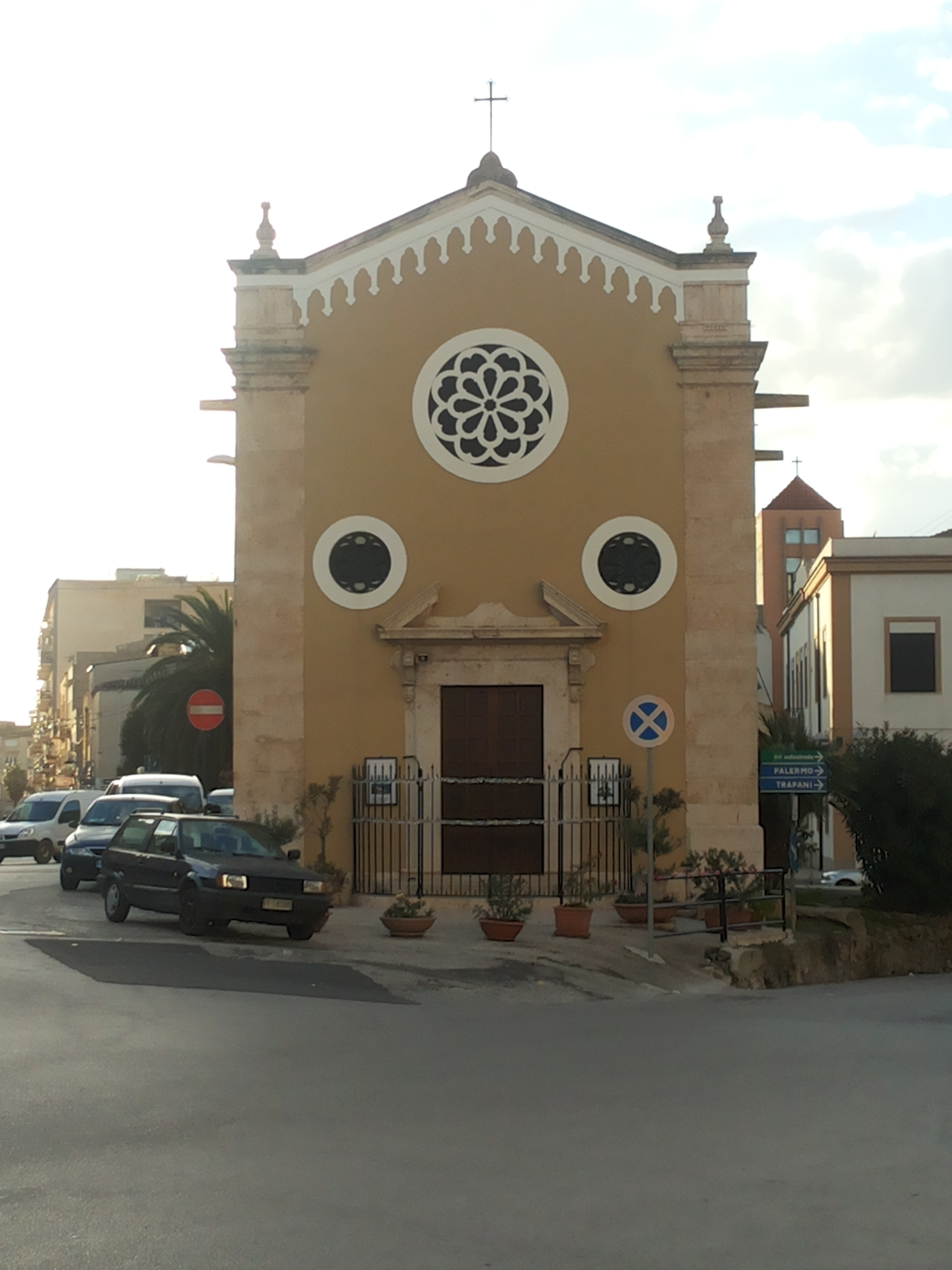 Chiesa Maria delle Grazie ad Alcamo